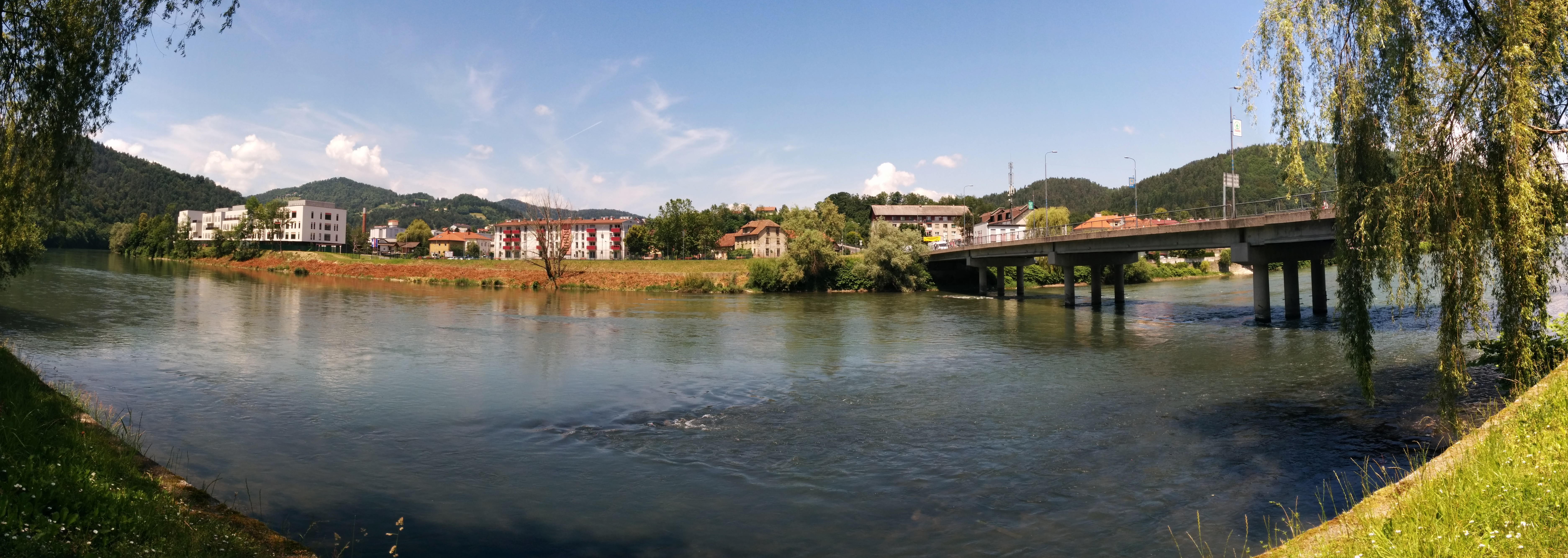 Litija, Slovenia